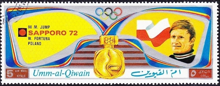 Wojciech Fortuna